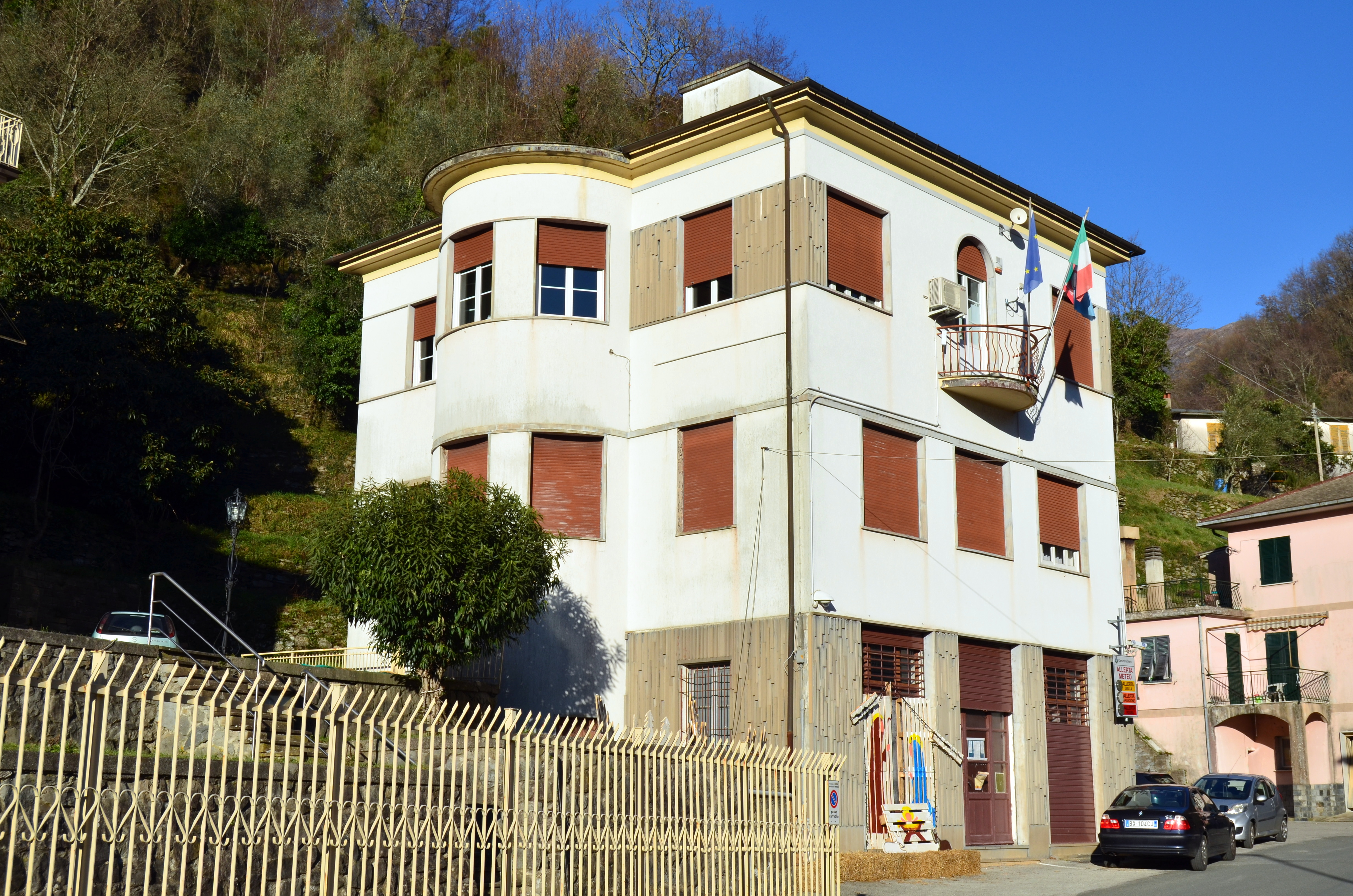 Il municipio di Orero, Isolona di Orero, Liguria, Italia